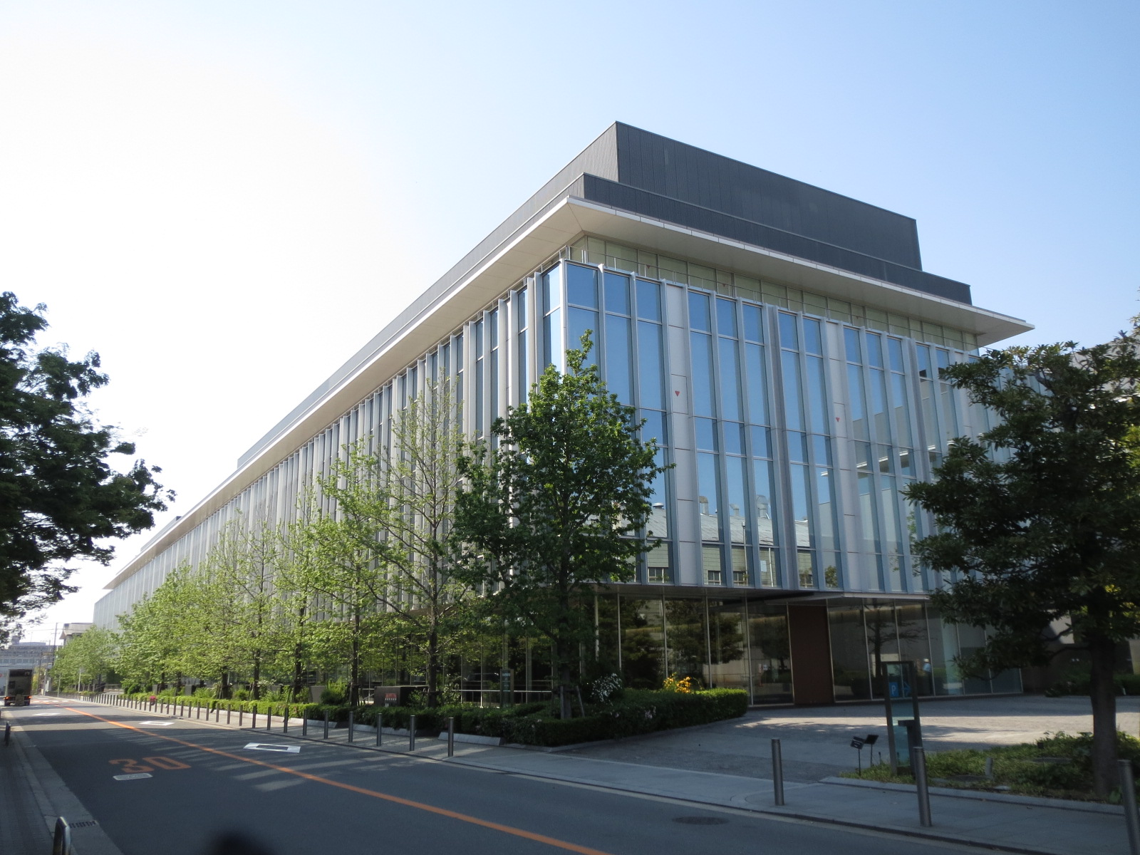 大阪まちなみ賞受賞 Canon IXY 3